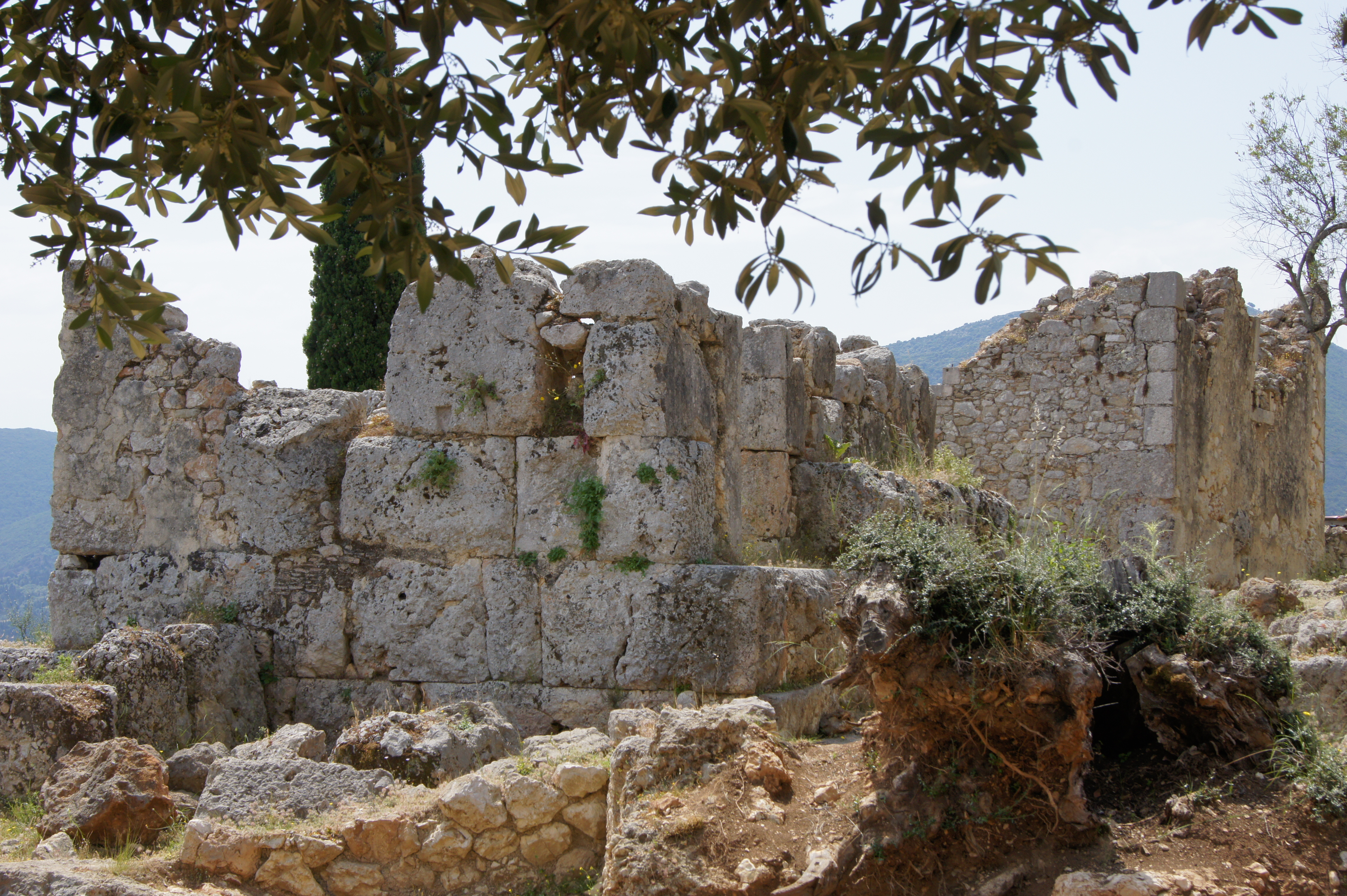 Vestiges supposés du palais d'Ulysse sur les hauteurs de Stavros, à Ithaque. Fouilles en cours en mai 2011.